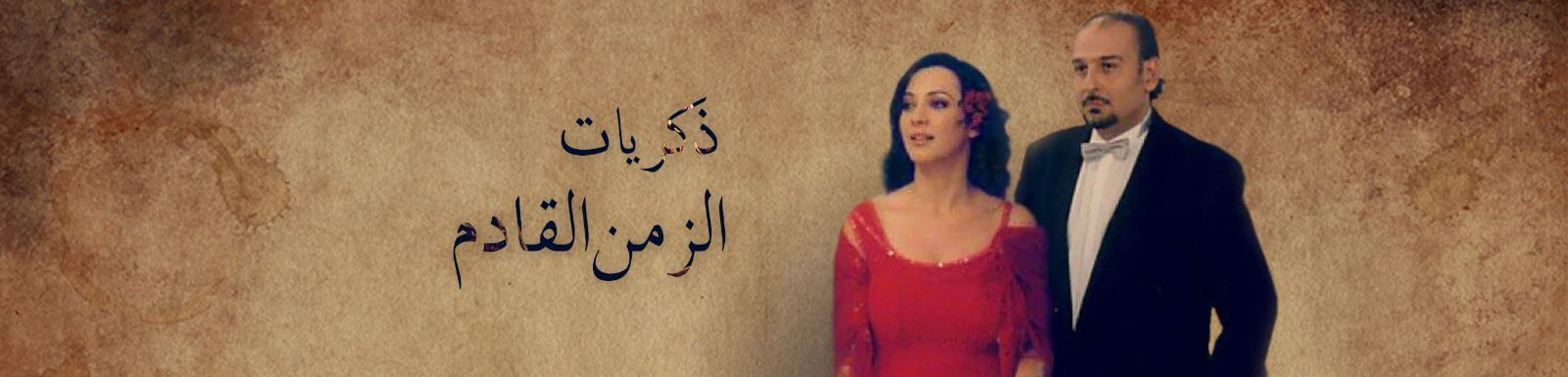 ذكريات الزمن القادم